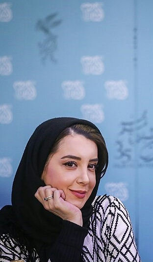 سحر جعفری جوزانی - ۱۳۹۵